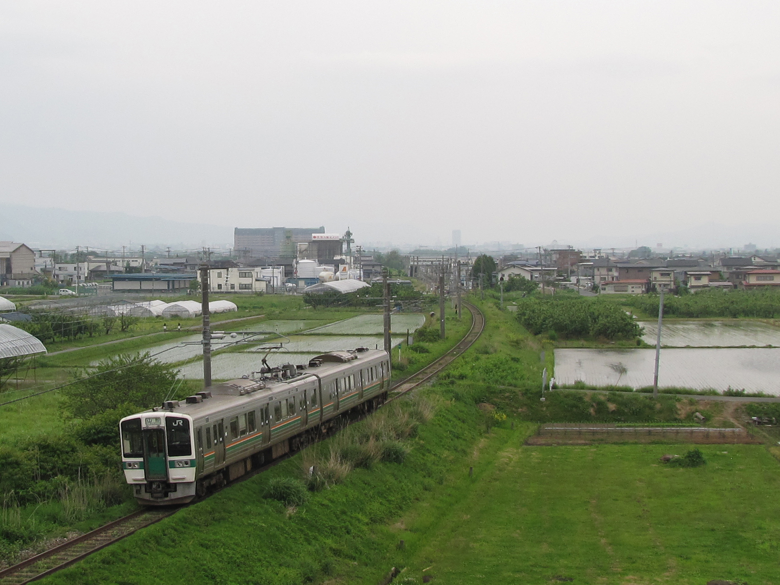 山形線を走る719系（漆山～高擶間）